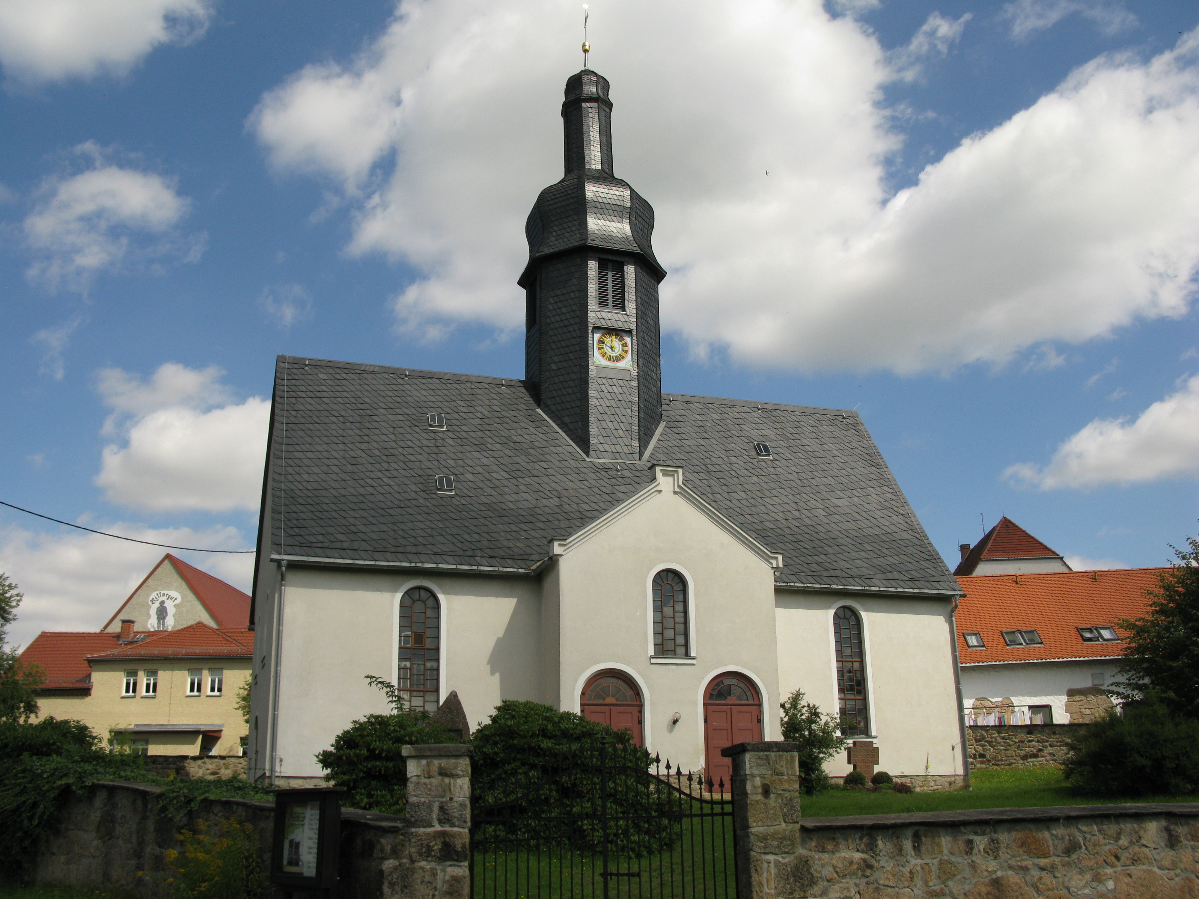 Lengenfeld (Vogtland): Kirche im Ortsteil Irfersgrün